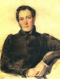 А. А. Полторацкий. Копия Е.П.Полторацкой с оригинала К.П. Брюллова. 1835 г.